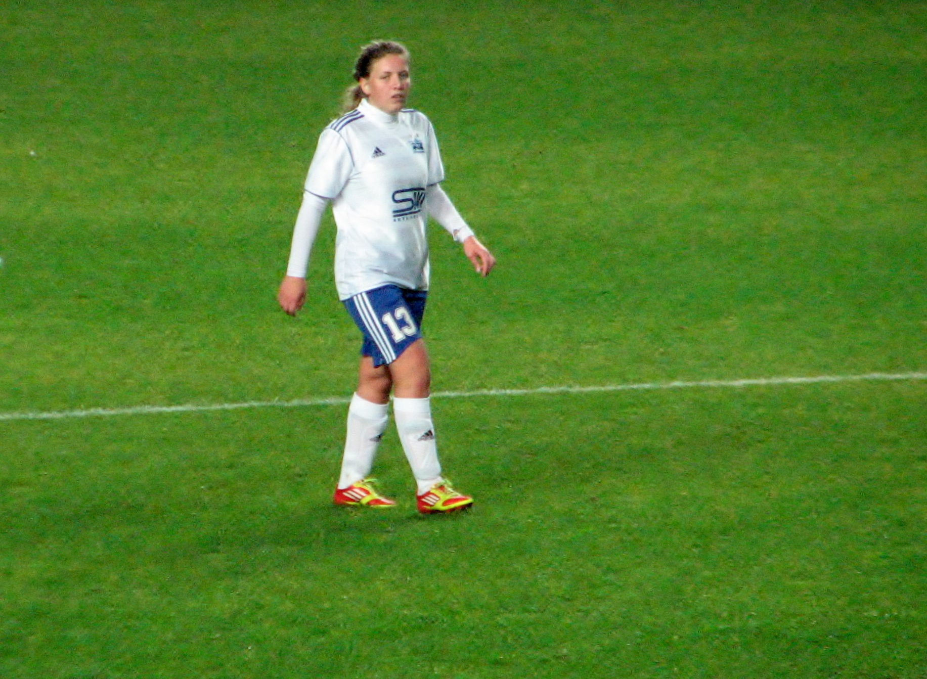 Margarita Žernosekova mängimas Pärnu JK ridades VfL Wolfsburgi vastu